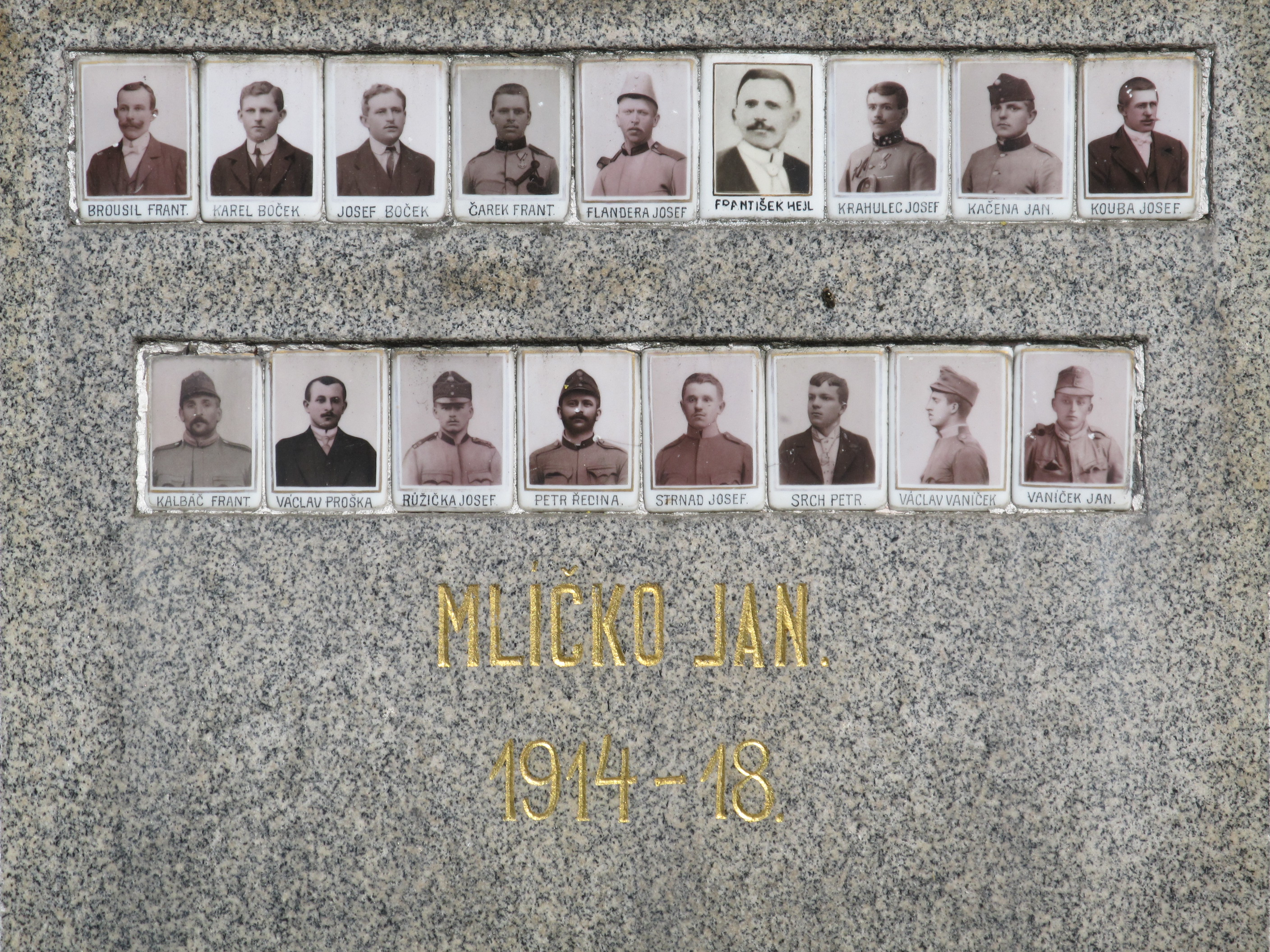 Škvořetice - pomník padlým - detail